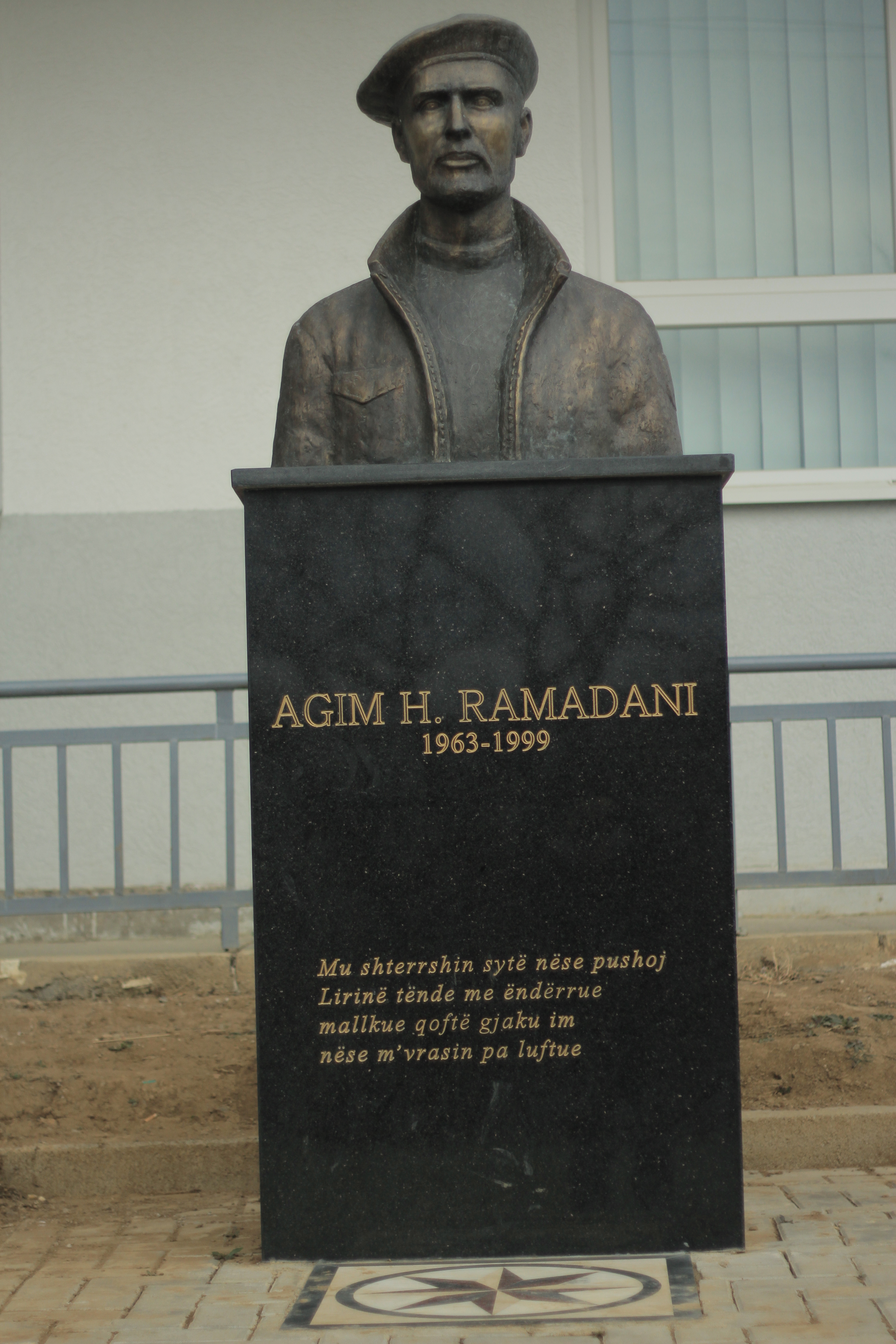 busti i Heroit Agim Ramadani